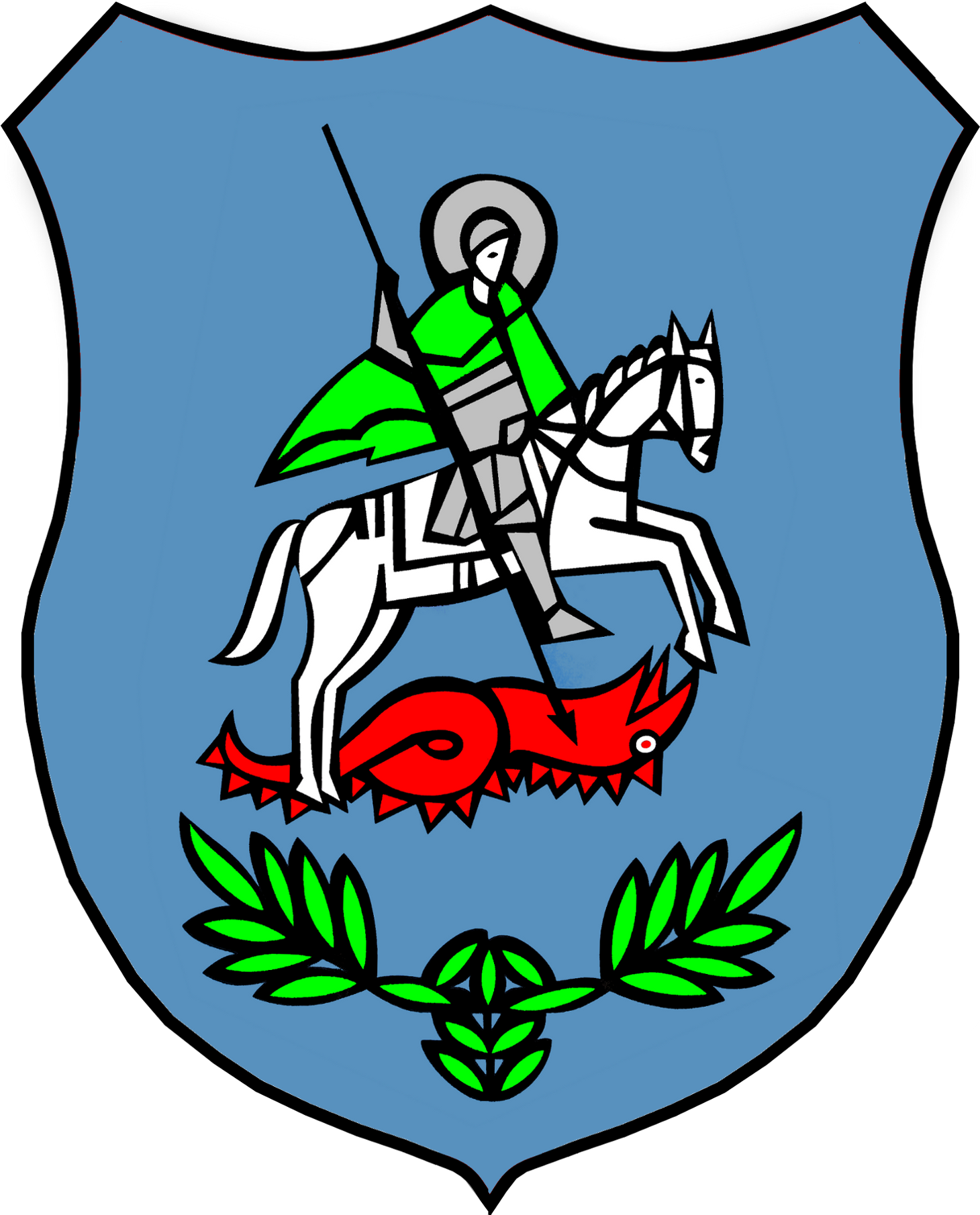 Herb Jasienicy w powiecie bielskim, gminie Jasienica